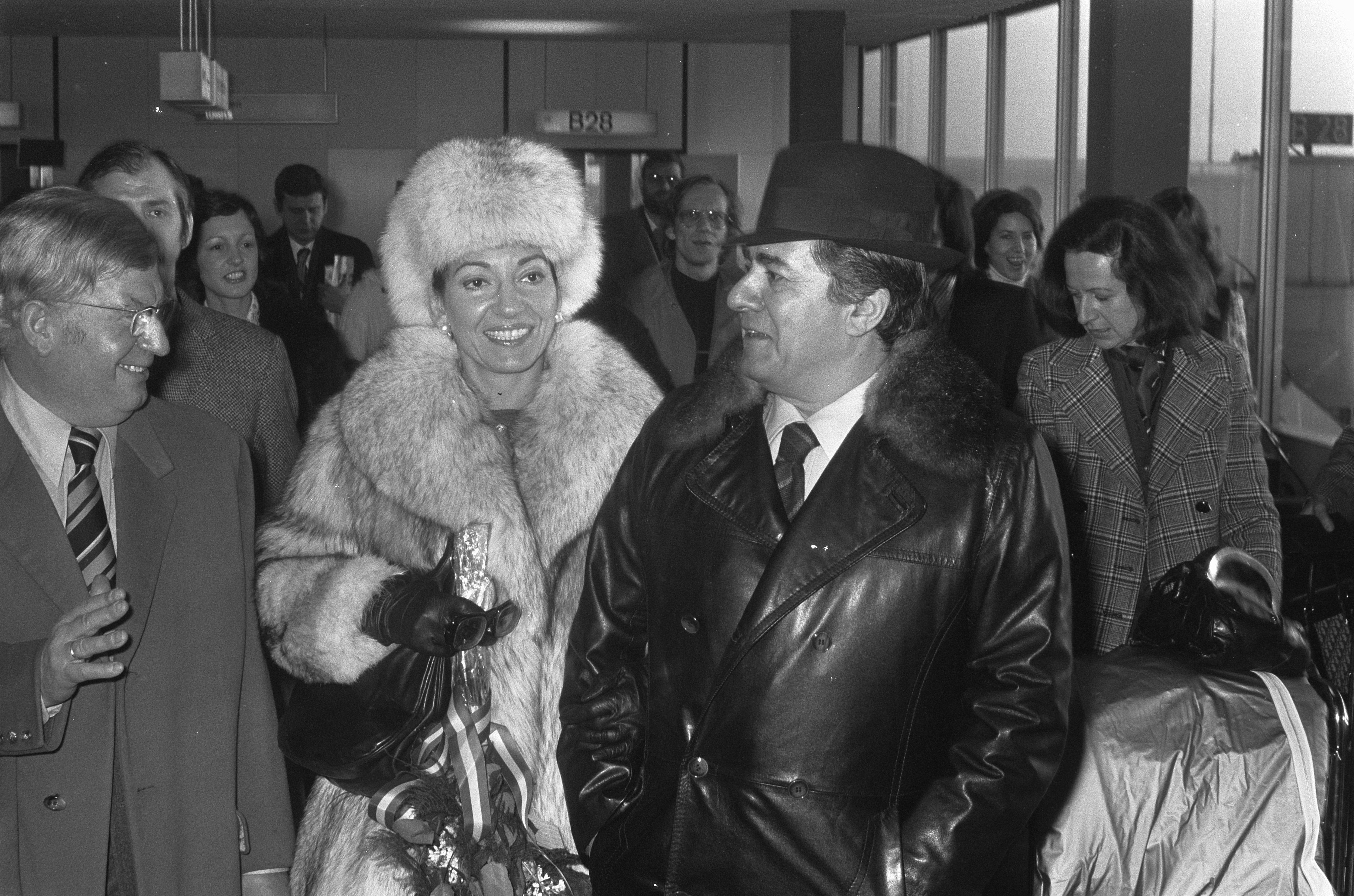 Collectie / Archief : Fotocollectie Anefo Reportage / Serie : Maria Callas op Schiphol Beschrijving : De zangeres, met naast haar de tenor Giuseppe di Stefano Annotatie : Maria Callas was bezig aan haar afscheidstournee Datum : 9 december 1973 Locatie : Noord-Holland, Schiphol Trefwoorden : sopranen, tenoren, zangeressen, zangers Persoonsnaam : Callas, Maria, Stefano, Giuseppe di Fotograaf : Fotograaf Onbekend / Anefo Auteursrechthebbende : Nationaal Archief Materiaalsoort : Negatief (zwart/wit) Nummer archiefinventaris : bekijk toegang 2.24.01.05 Bestanddeelnummer : 926-8775